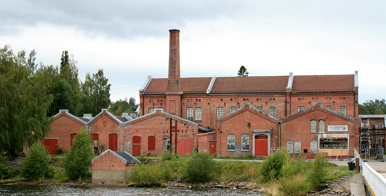 Kapp Melkefabrikk, Østre Toten, Norway.